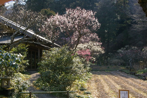 東慶寺の白蓮舎（立礼茶室）。